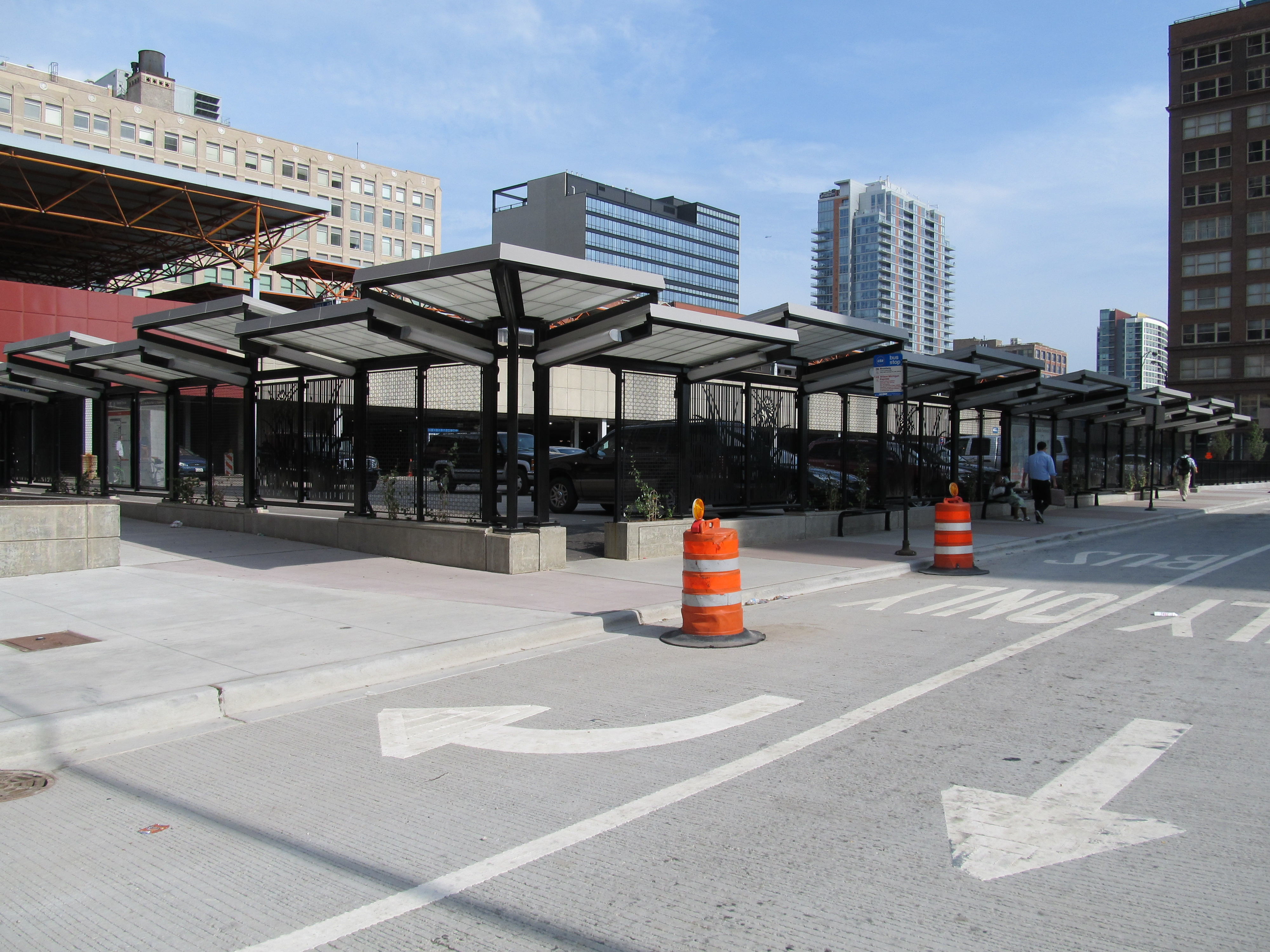 LaSalle/Congress Intermodel Transfer Center